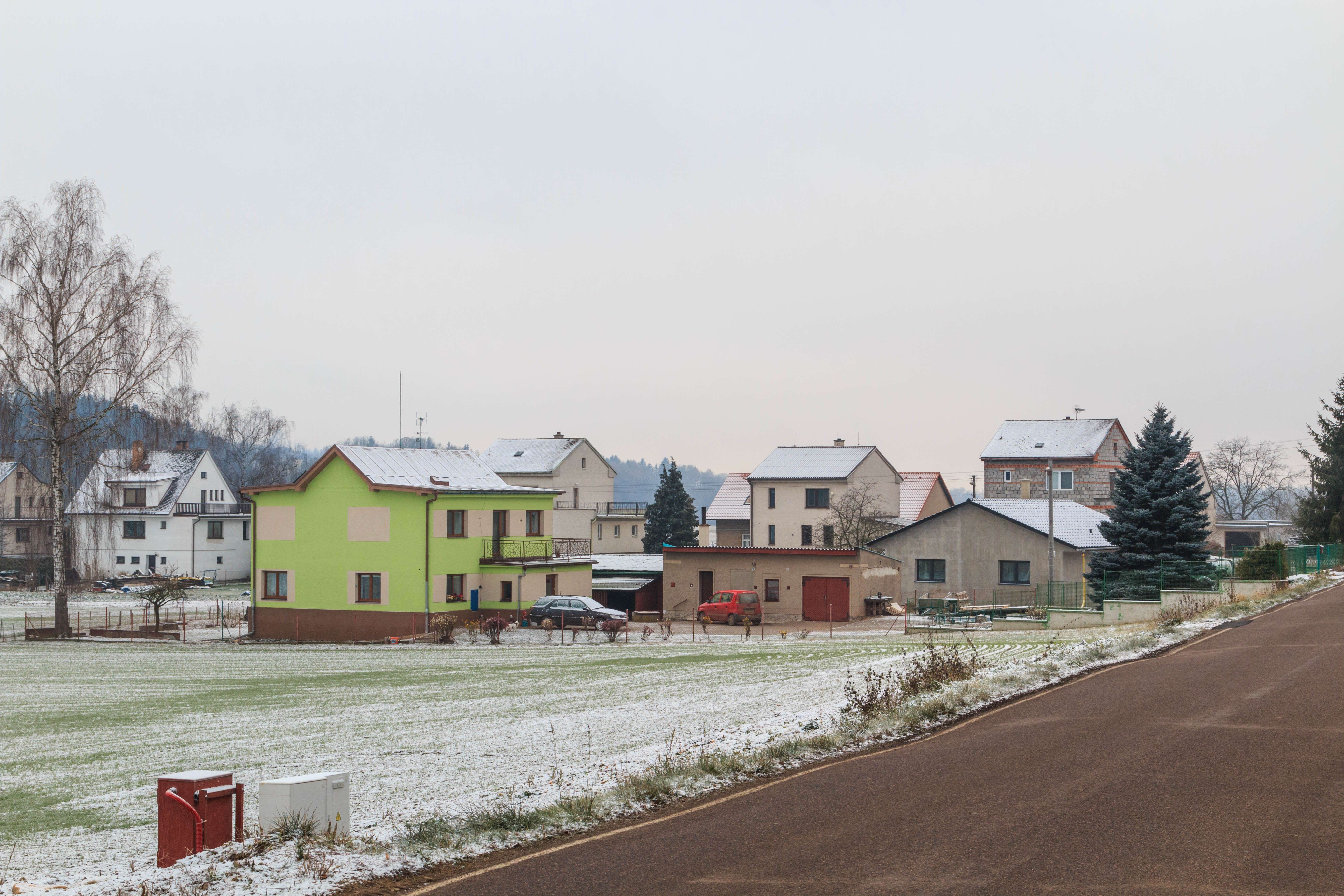 Synkov - čp. 60